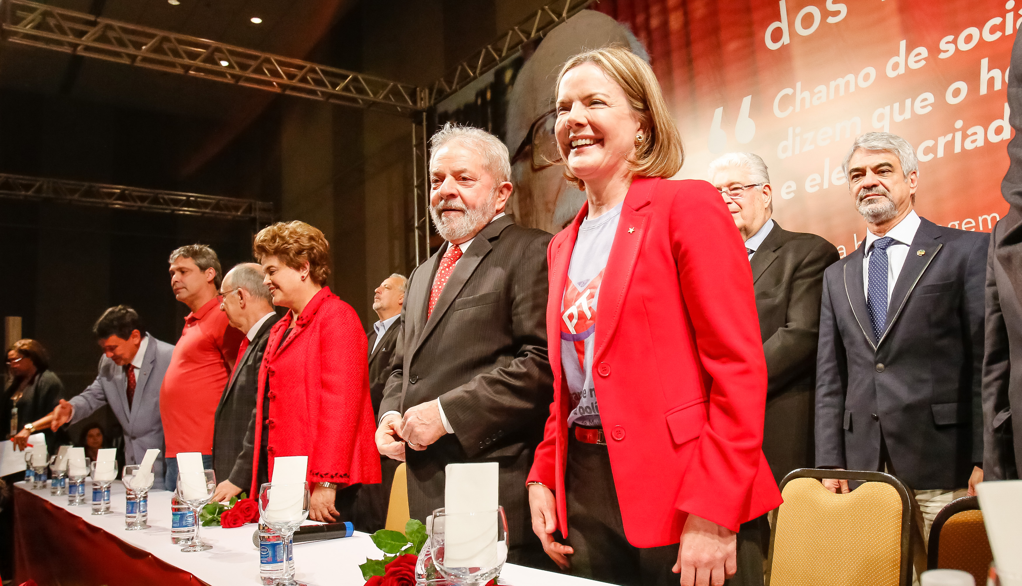 Brasília - DF, 05/07/2017. Dilma Rousseff, durante posse da senadora Gleisi Hoffmann (PT-PR) como presidenta do Partido dos Trabalhadores. Foto: Roberto Stuckert Filho